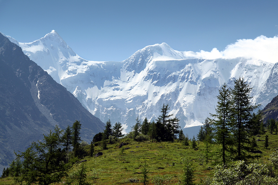 Altay mountains (Belukha), photo by Vít Hněvkovský, 2006 Pohoří Altaj (hora Bělucha)